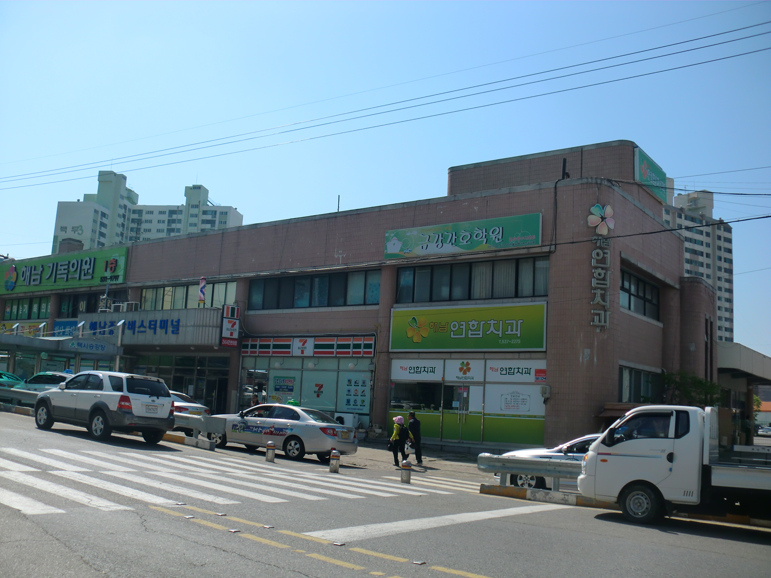 전라남도 해남군에 있는 해남종합버스터미널